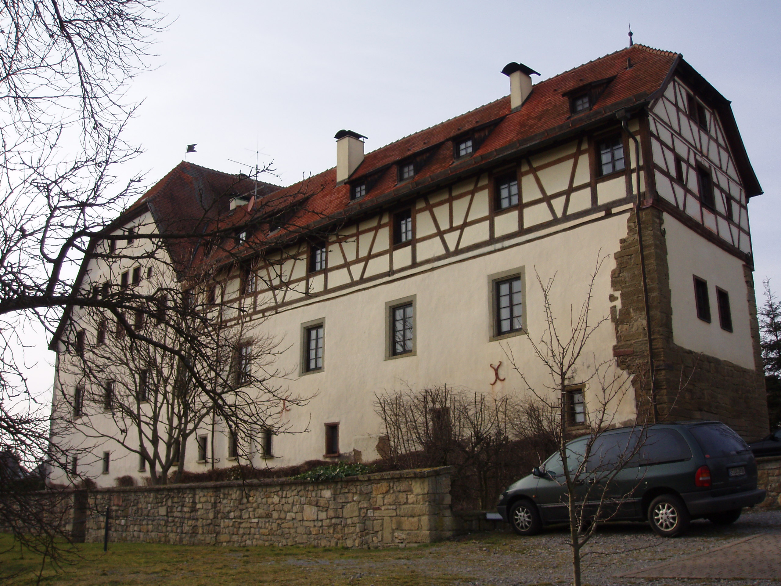 Schloss Vollmaringen, heute als Wohnbau genutzt